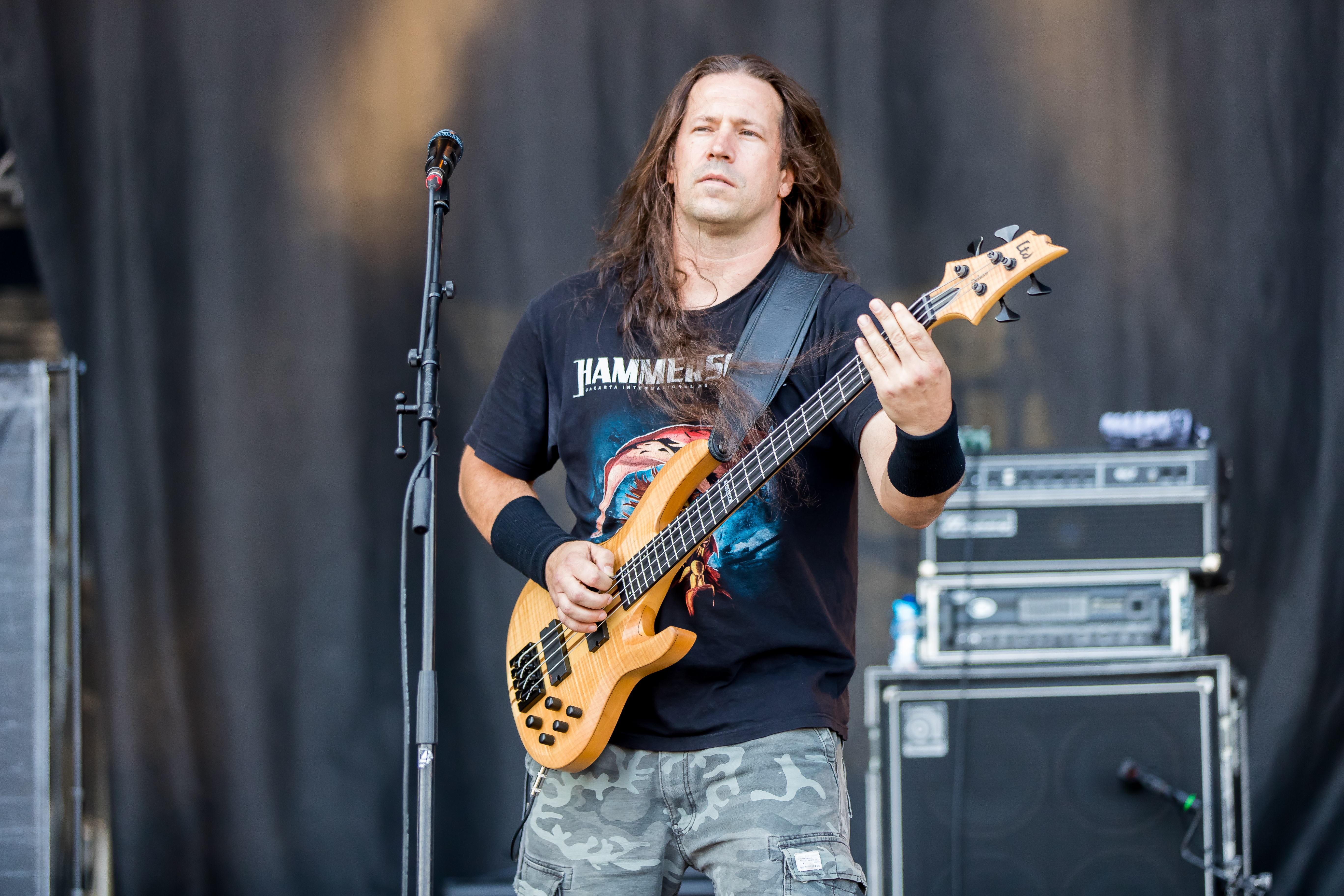 Dying Fetus during Summer Breeze 2016 at , Dinkelsbühl, Bayern, Germany on 2016-08-19, Photo: Sven Mandel